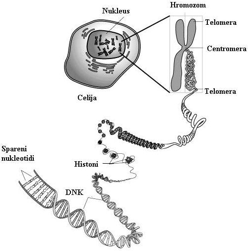 Hromozom